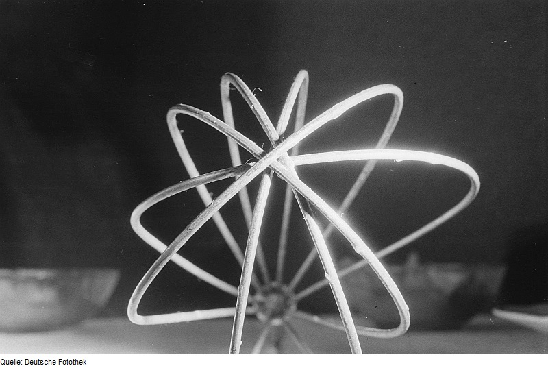 Original image description from the Deutsche Fotothek Schneebesen